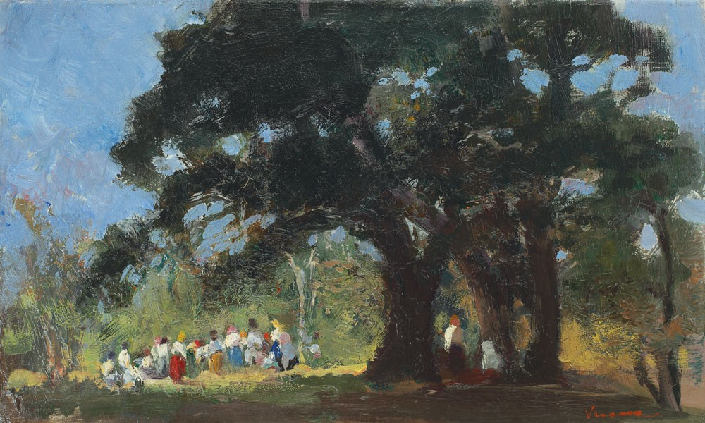 Serbare campeneasca